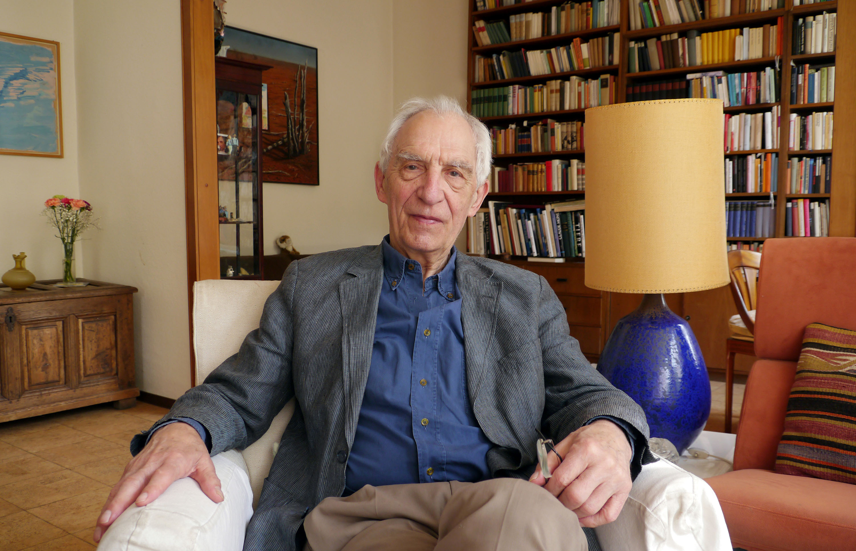 Dieter Wellershoff (*3. Nov. 1925), deutscher Schriftsteller, lebt in Köln